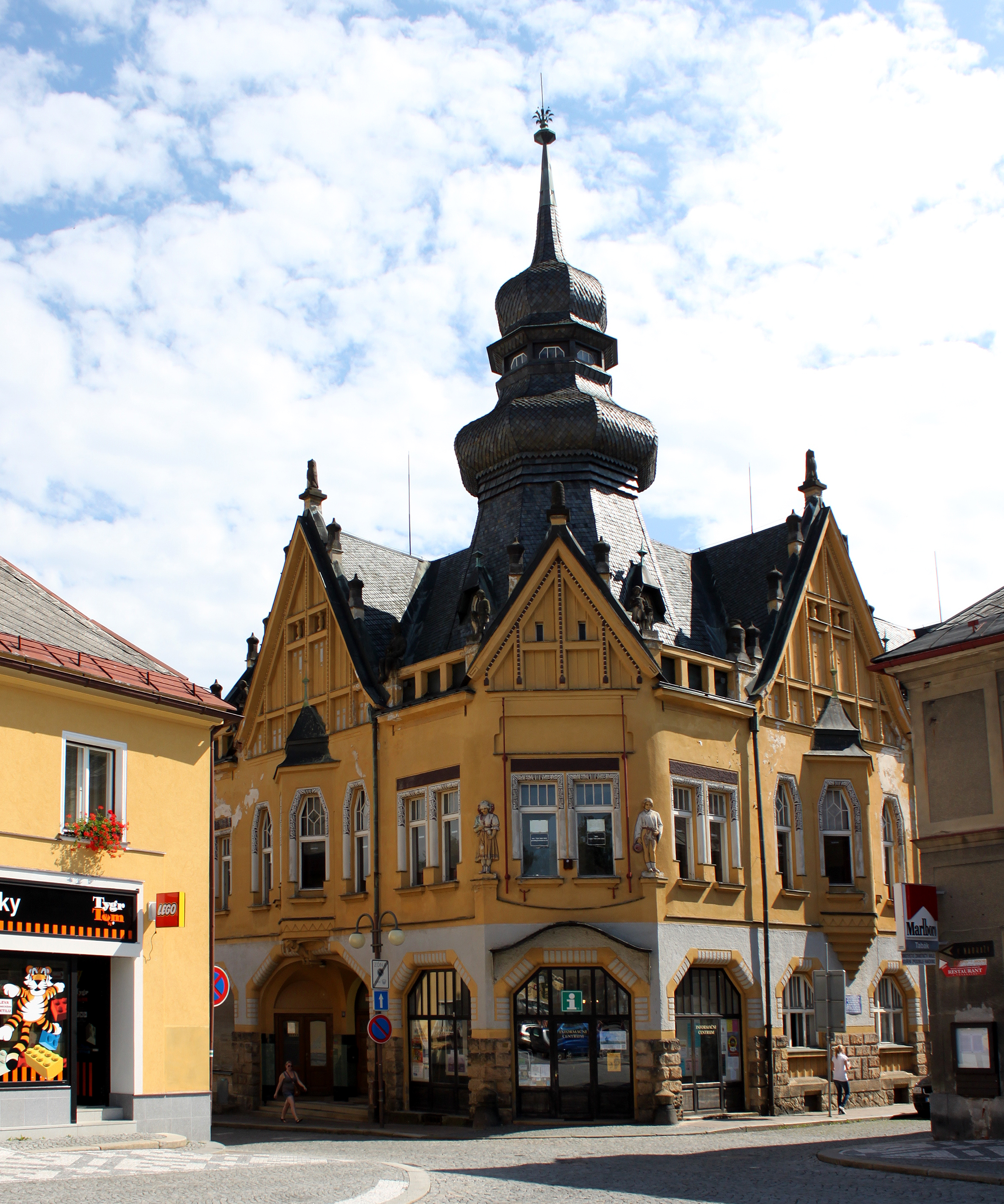 514 01 Jilemnice, Czech Republic